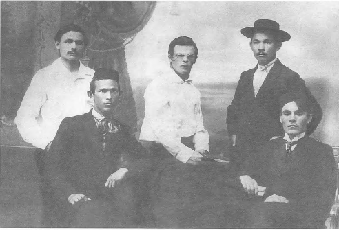 Башҡортса: Бабич һәм Әлмөхәмәтов әҙиптәр араһында. Өфө, 1917 йыл